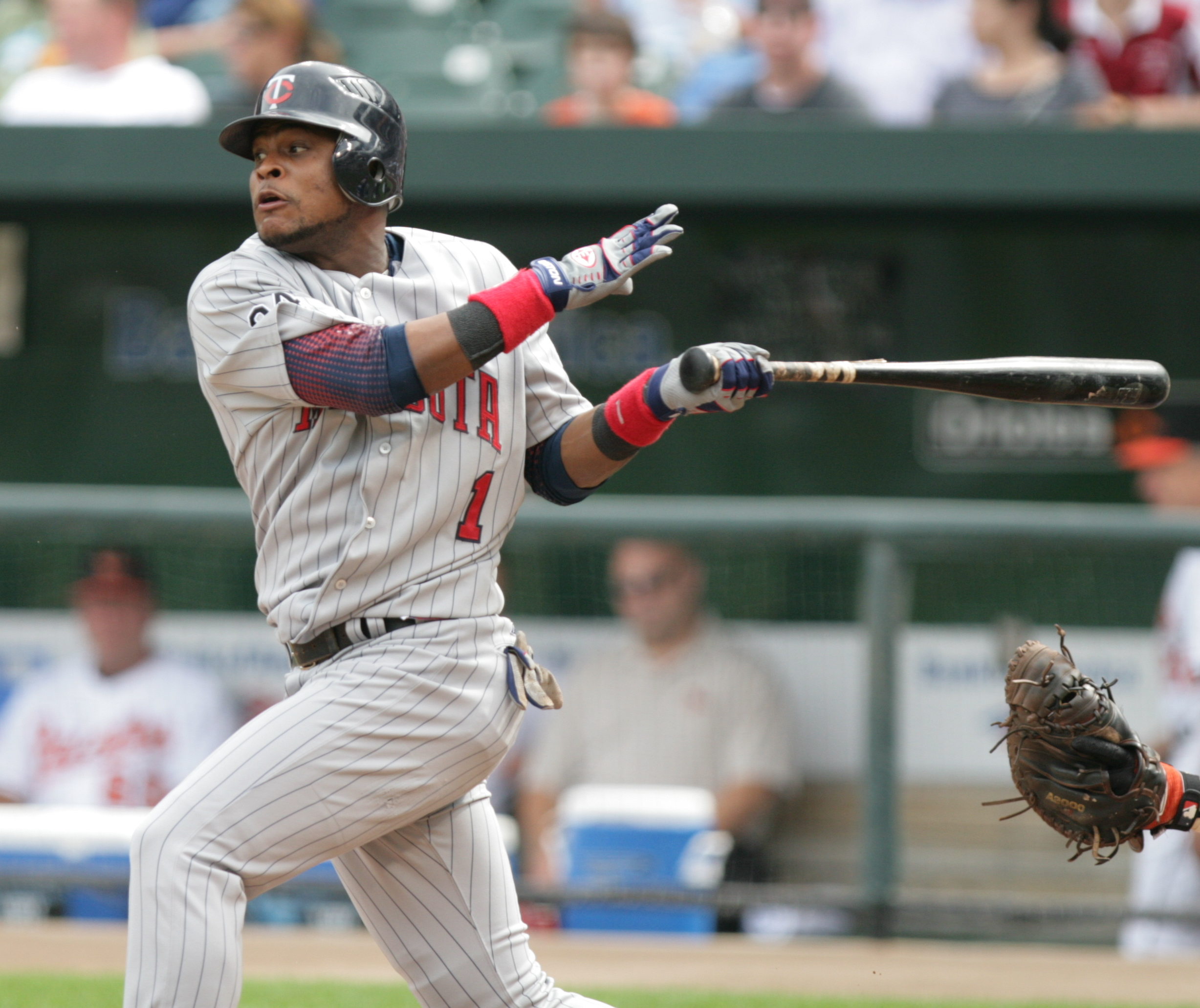 Luis Castillo